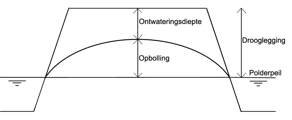 Afbeelding met daarop het verschil tussen ontwateringsdiepte en drooglegging